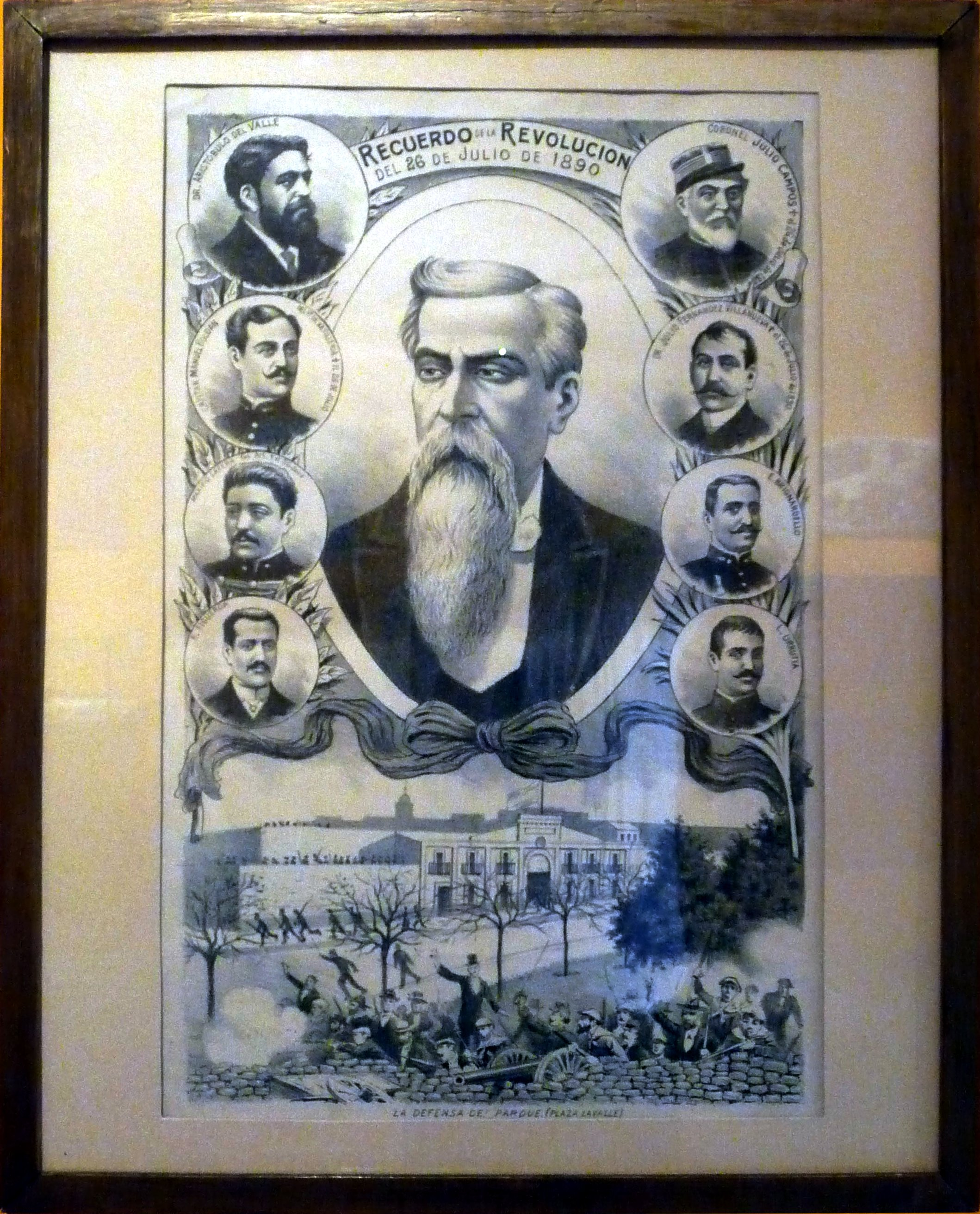 Recuerdo de la Revolución del Parque de 1890 Litografia (f.8691)